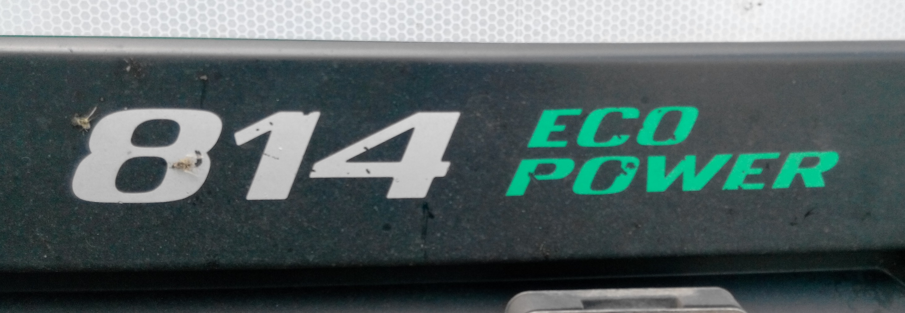 Напис "Ecopower" на фальшрадіаторній решотці Mercedes 814 з двигуном OM904LA